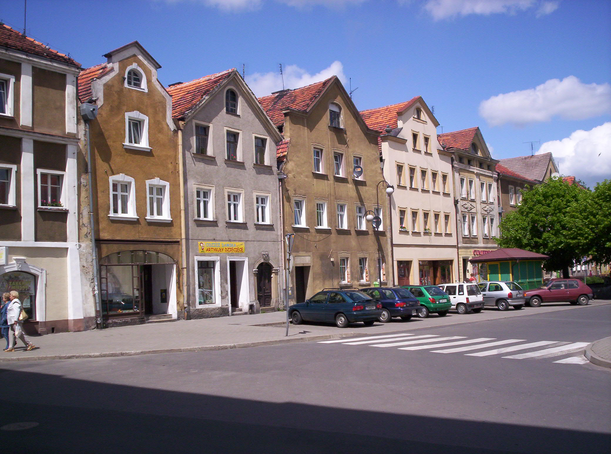 the market square